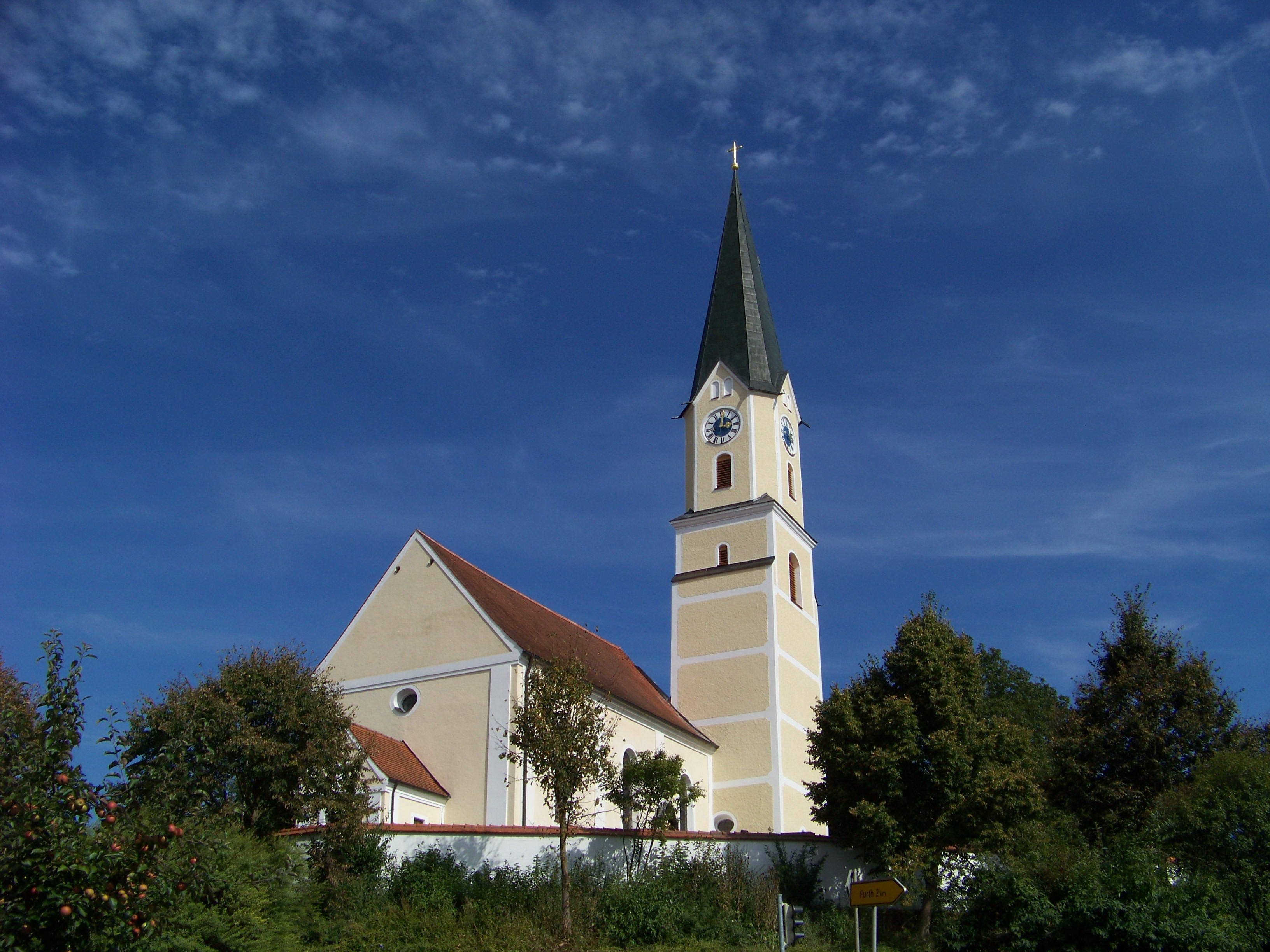 Weihmichl, Hauptstraße 24. Kirche St. Willibald. Chor und Langhaus barock, 1725, Turmuntergeschosse spätgotisch; mit Ausstattung.